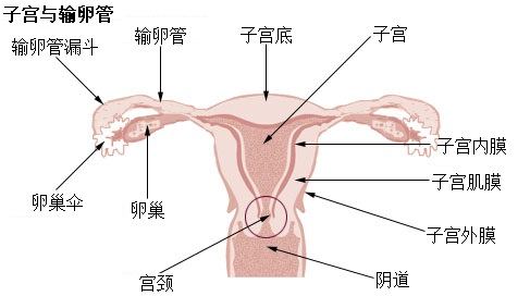 女性生殖系统